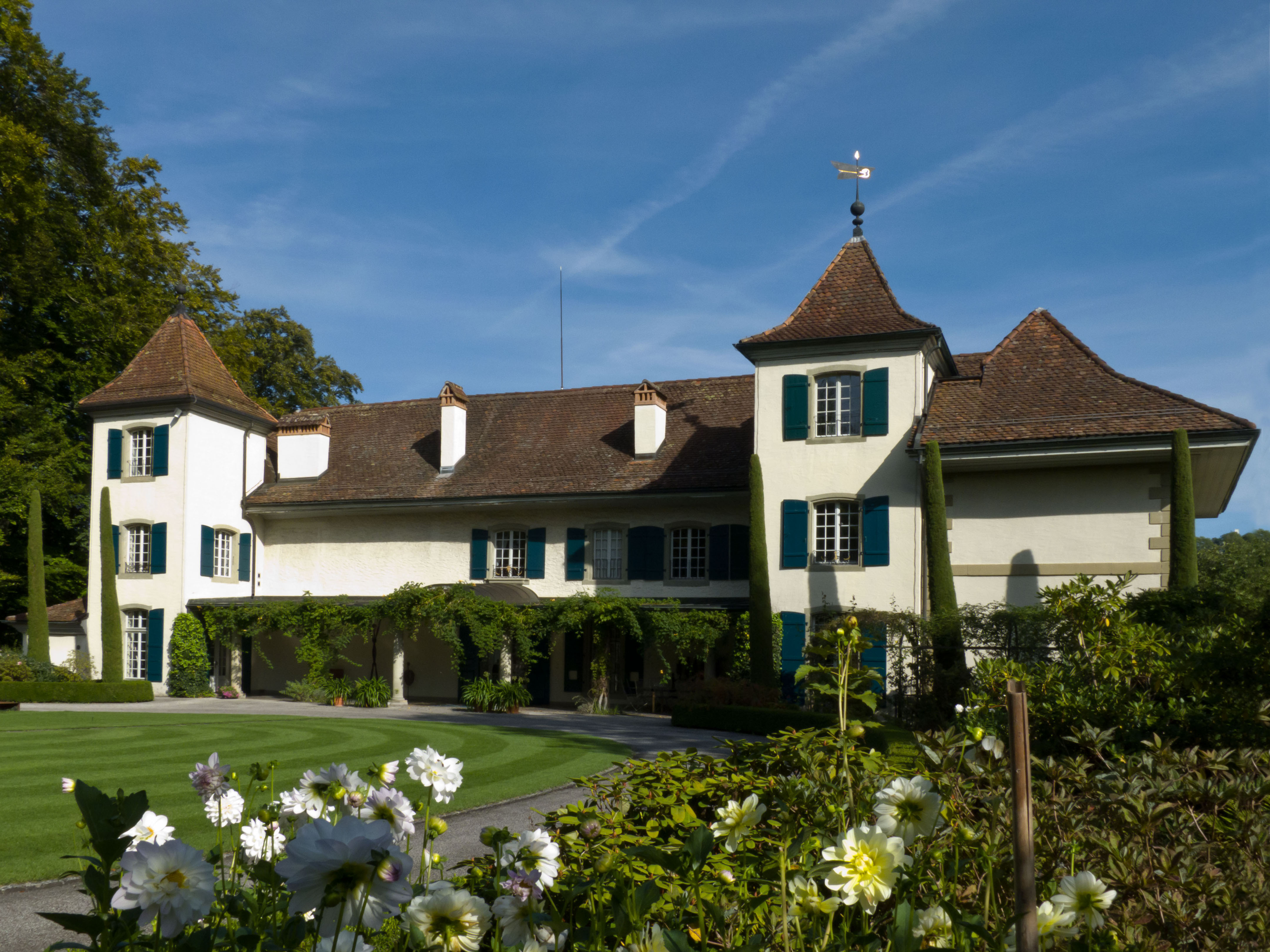 Westfassade Schloss Bremgarten